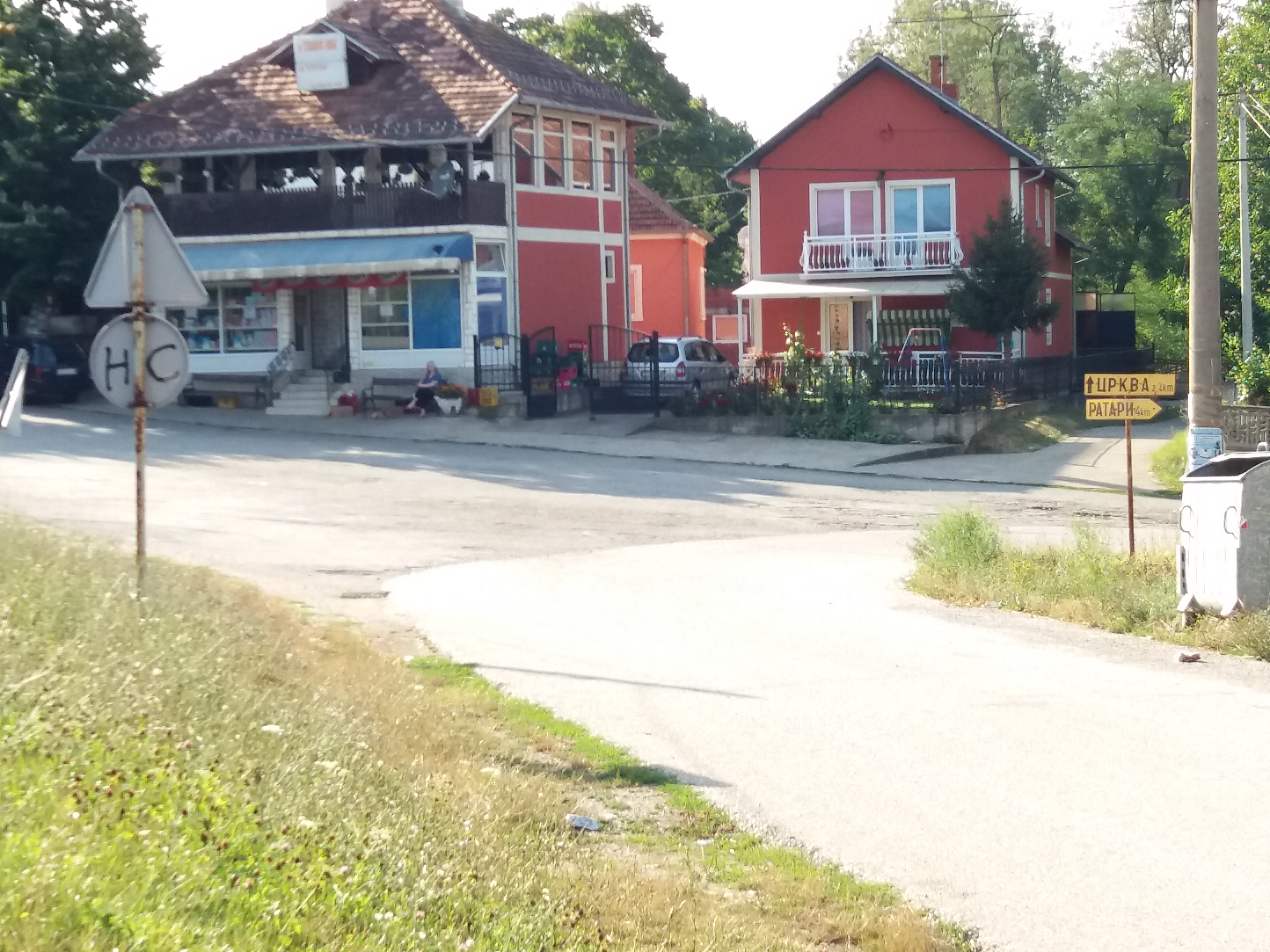 Srpski (latinica): Cerovac